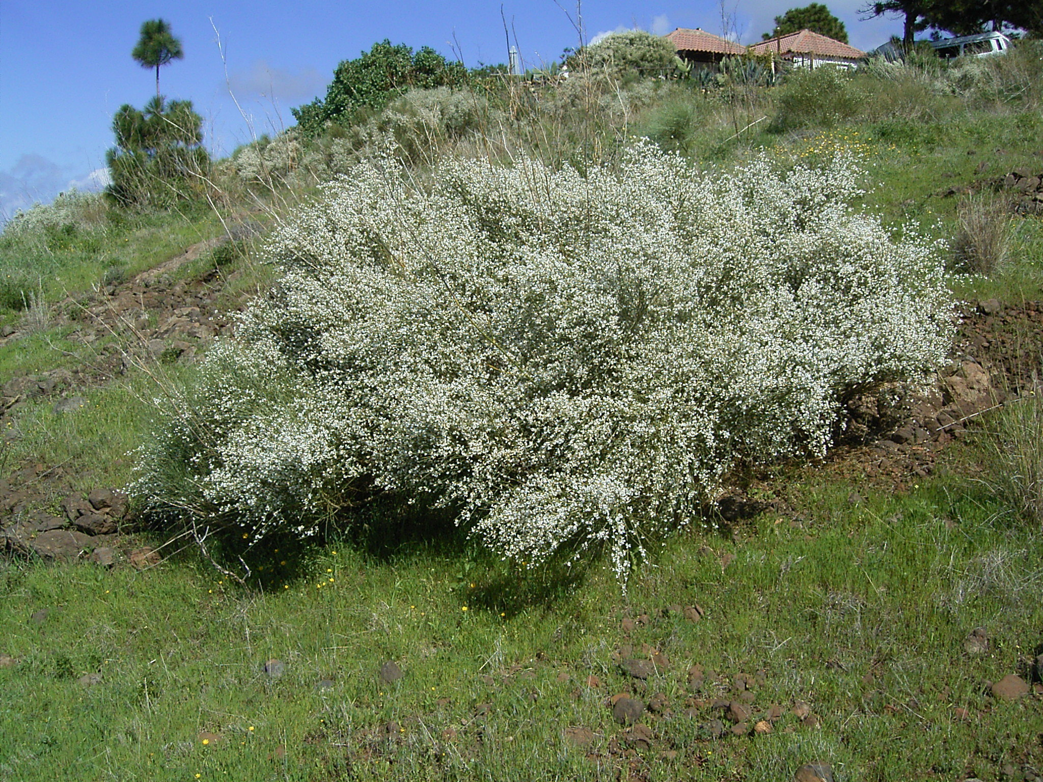 Retama raetam growing in Puntagorda, La Palma, Canary Islands